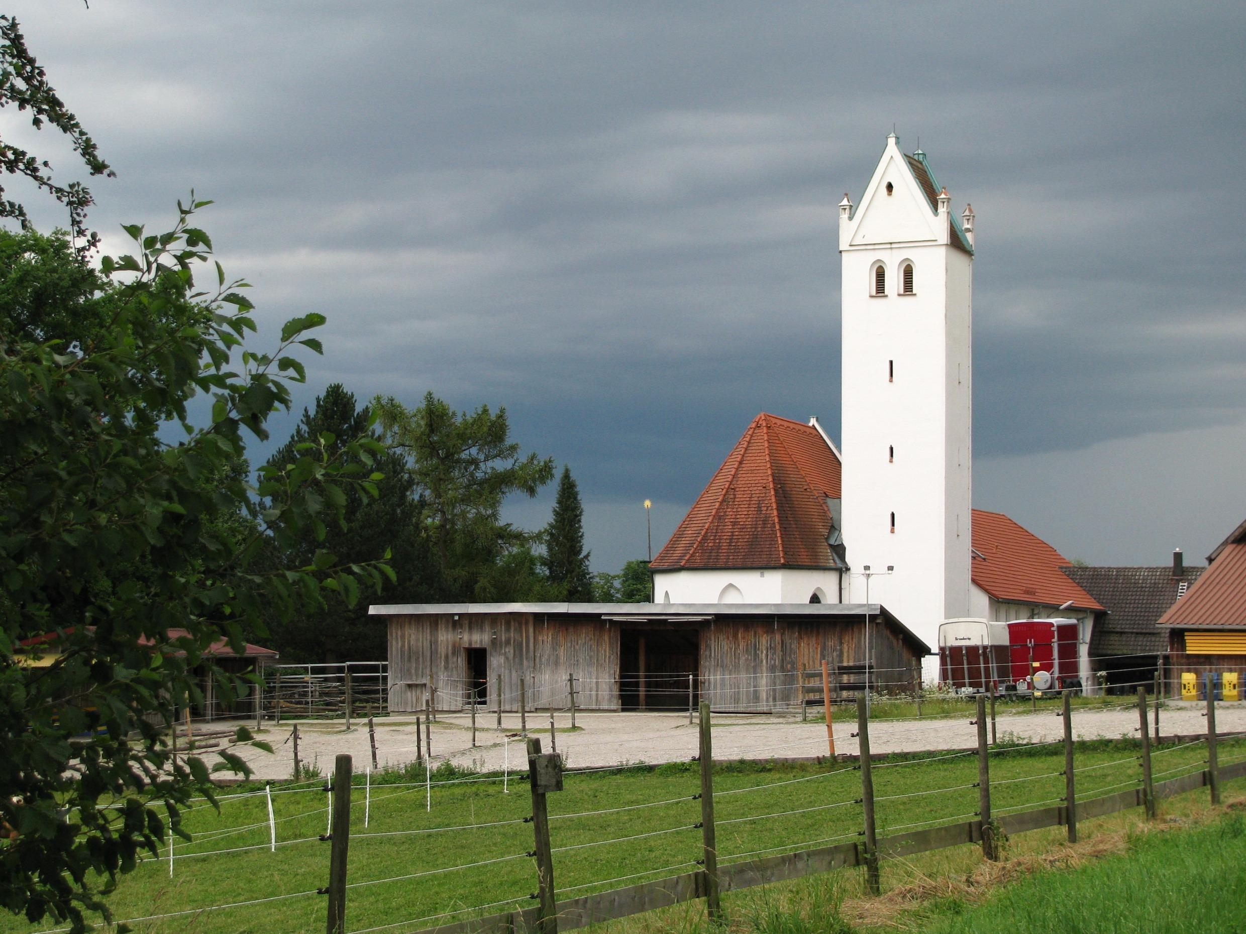 Kath. Votivkapelle St. Maria und Georg in Hoflach bei Alling aus nordöstlicher Richtung.